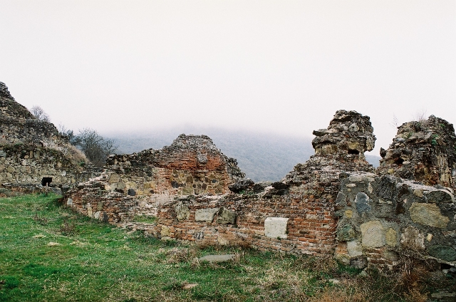 დმანისის ნაქალაქარი